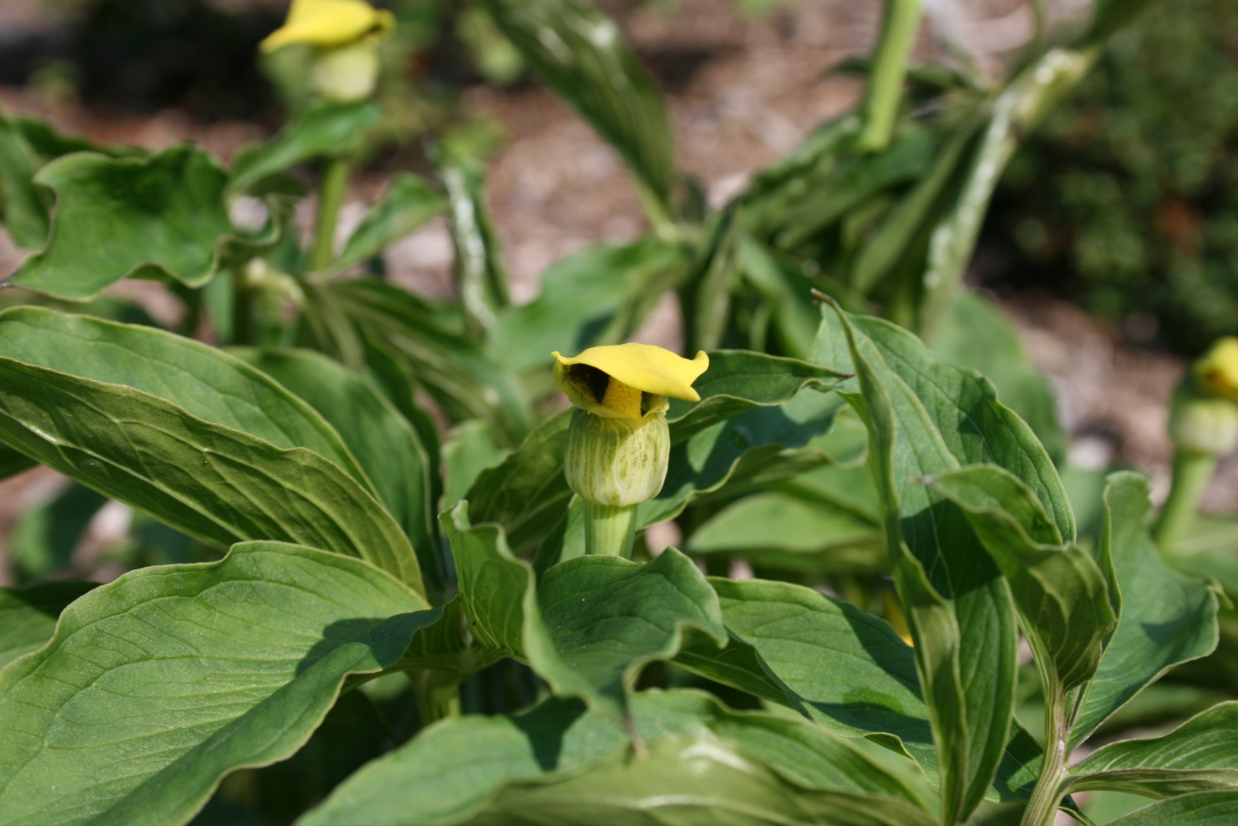 Arisaema flavum: Flower.